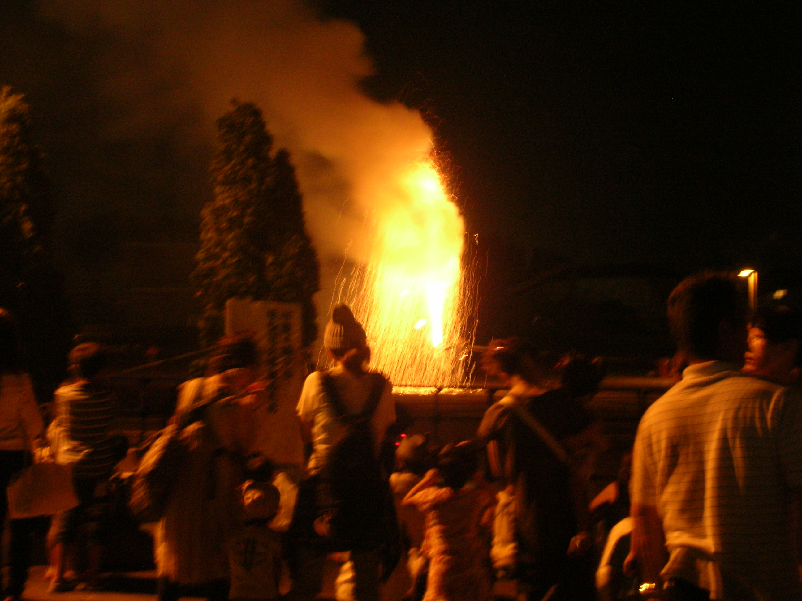 2015まほろば夏まつり 手筒花火